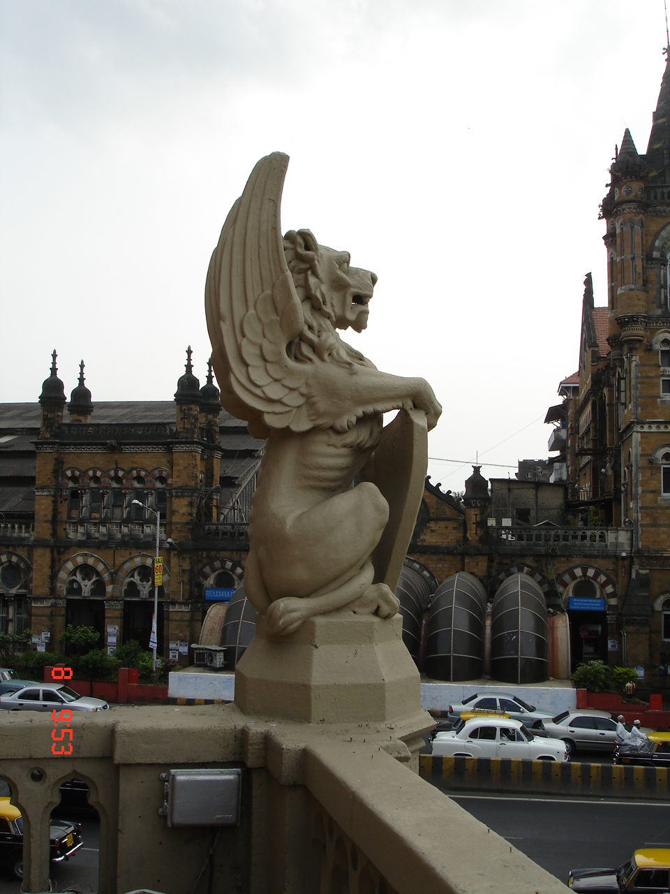 BMC sculpture